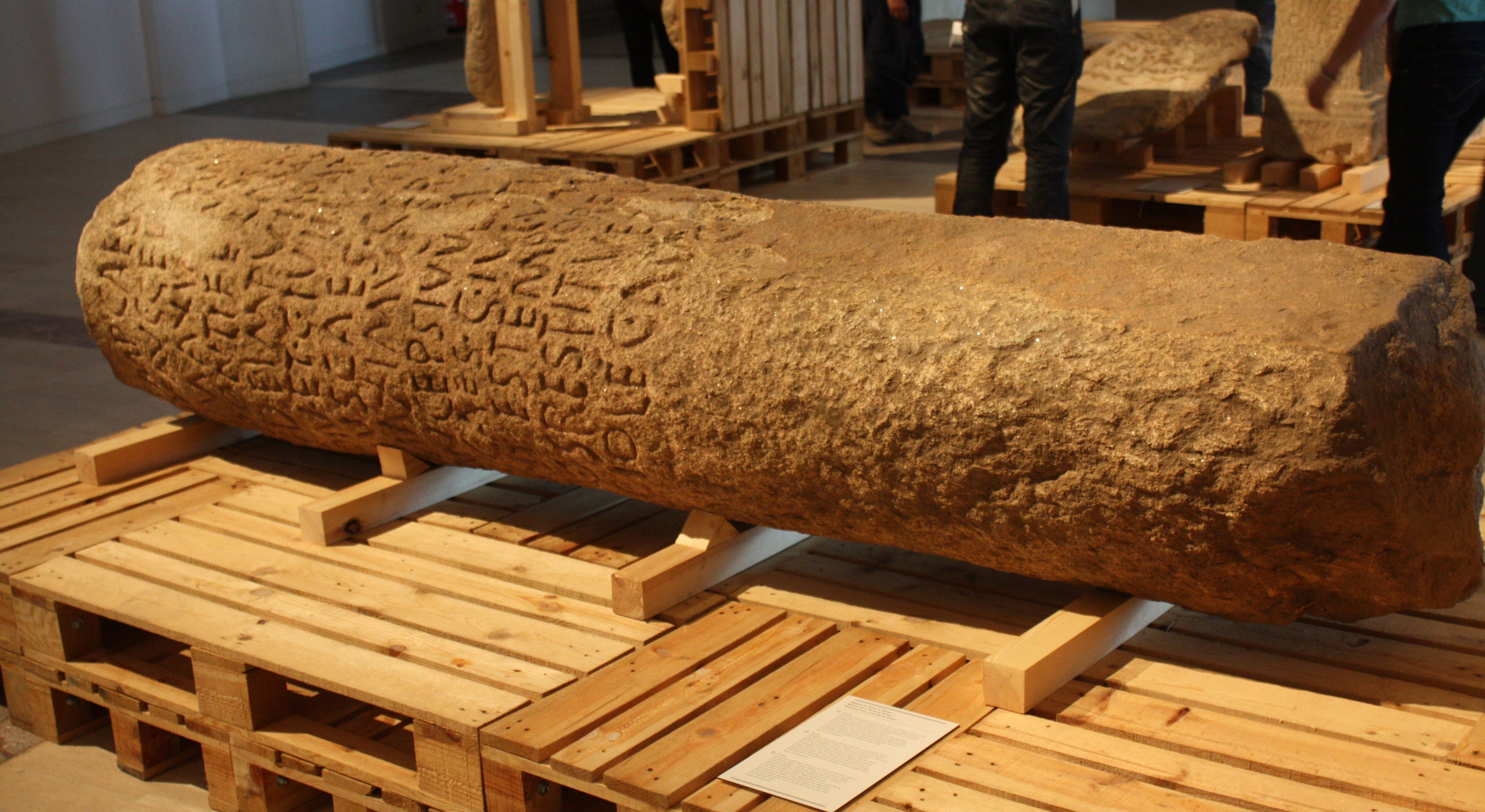 Miliario romano encontrado en el Ponte de Burgo en Pontevedra (España), (No es EE IX, 420 - la secunda linea es diferente)